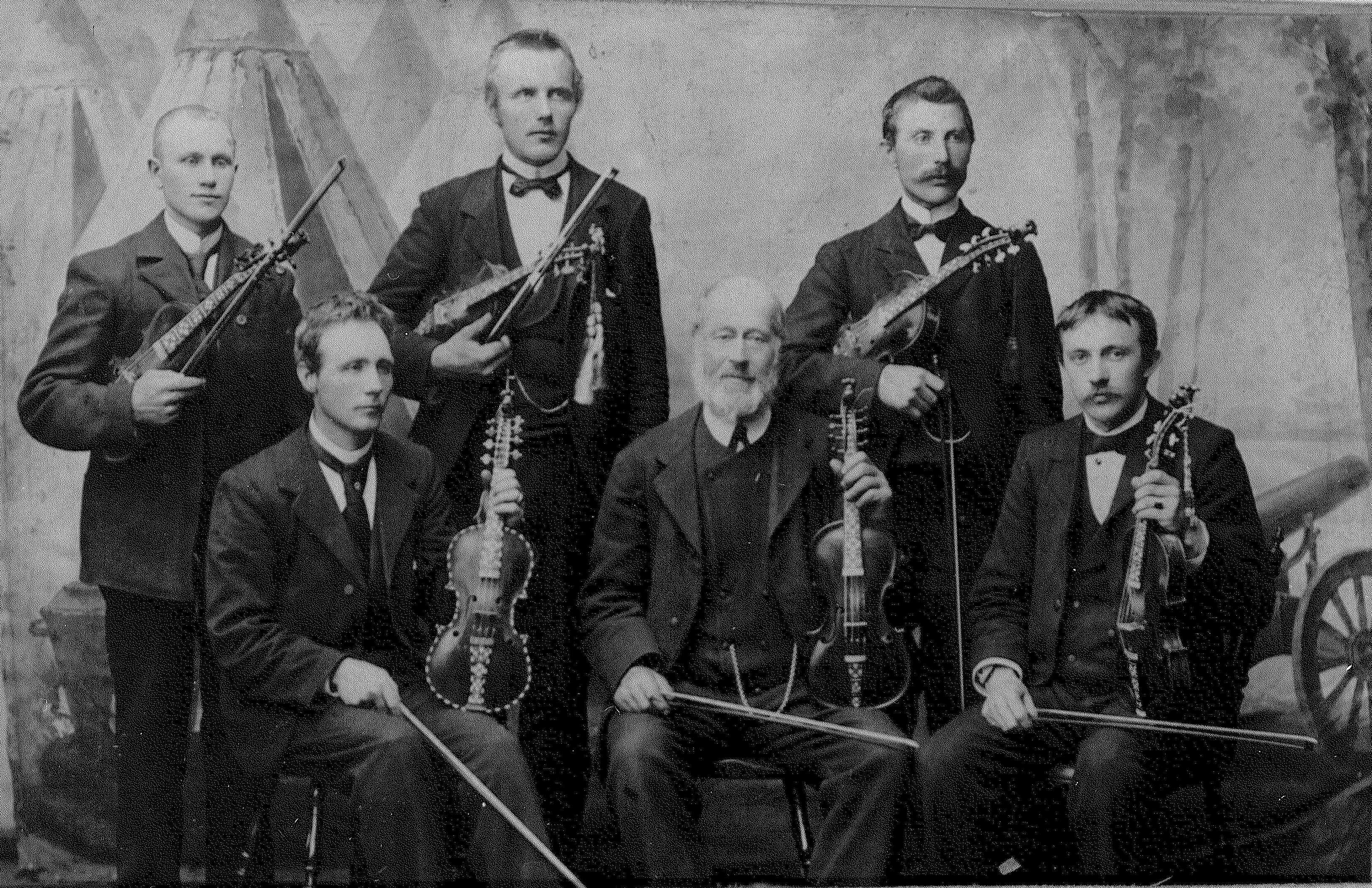 Kappleik i Bergen, 1904. Gruppebilde av spelemenn